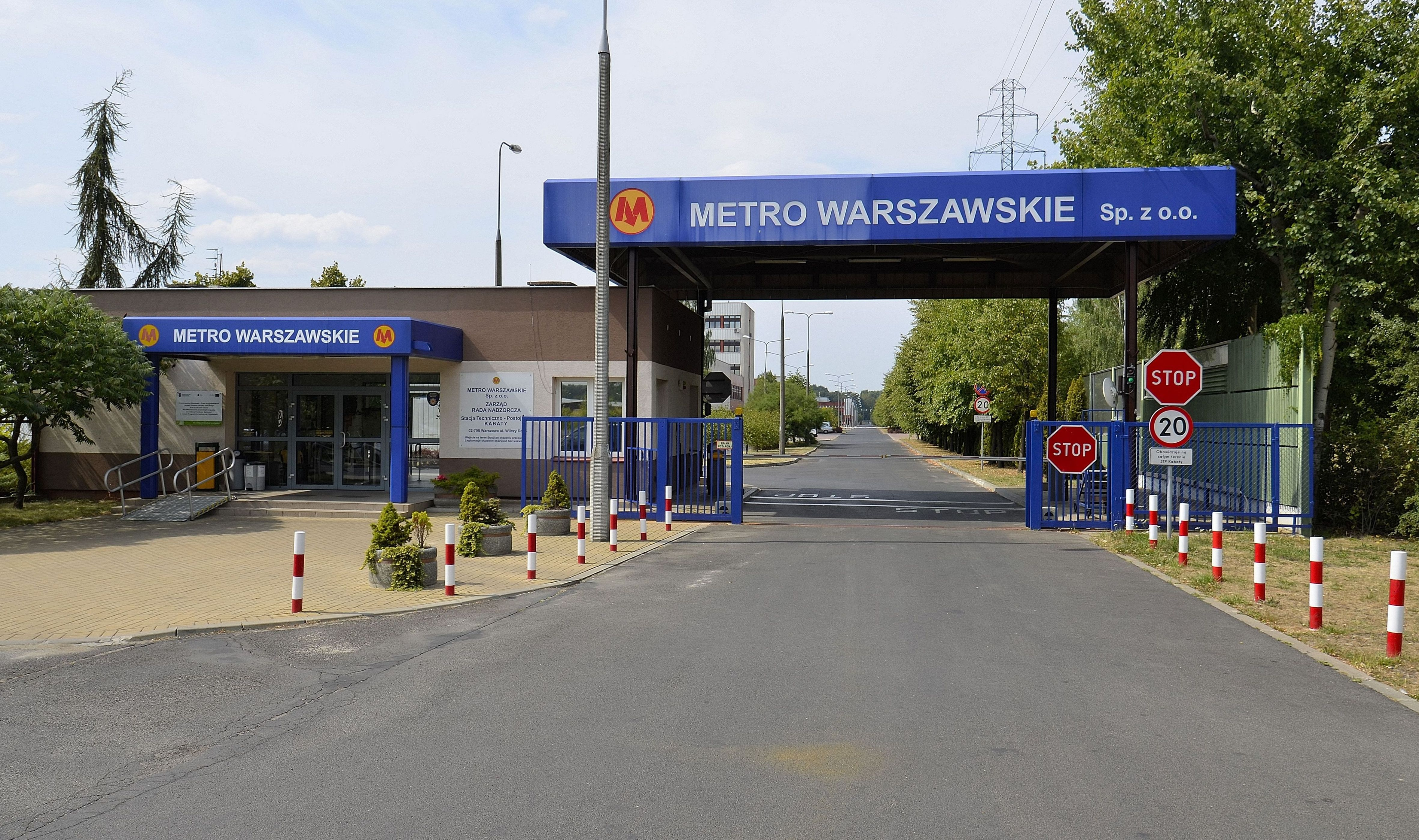 Wjazd na teren Metra Warszawskiego/STP Kabaty przy ul. Wilczy Dół 5 w Warszawie